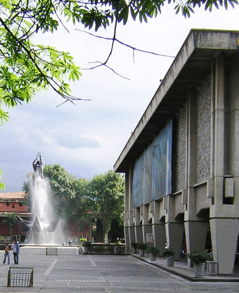 Biblioteca Central, Universidad de Antioquia, Medellín, Colombia (esta foto la tome yo, y la libero al dominio público)